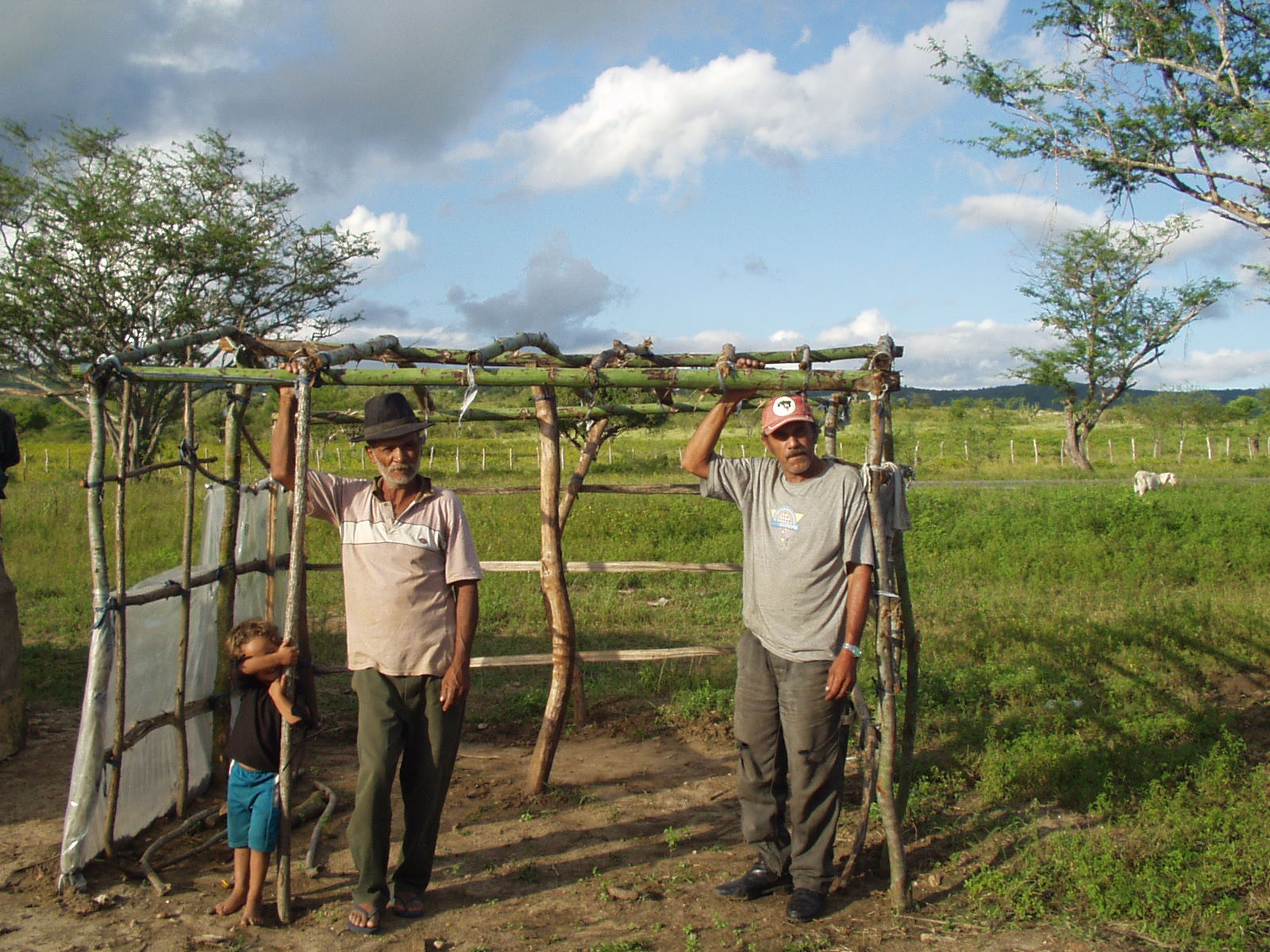 Occupation territoriale par des Sans-Terre. Auteur: Julien Vandeburie